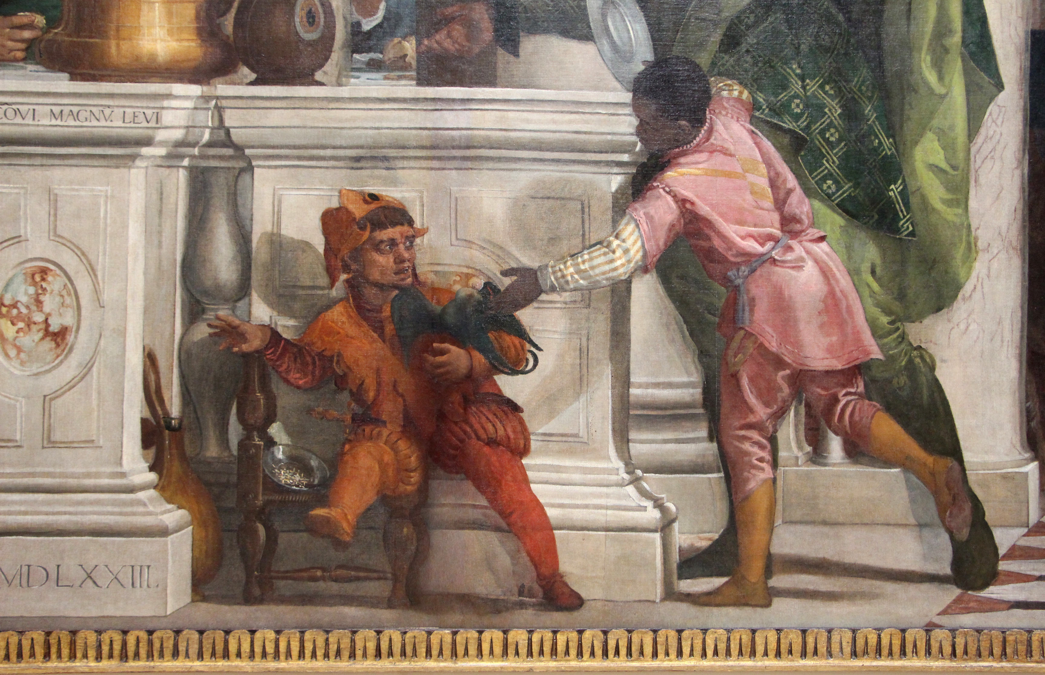 Gallerie dell'Accademia - MIBAC The making of this document was supported by Wikimedia CH. (Submit your project!) For all the files concerned, please see the category Supported by Wikimedia CH. This is a photo of a monument which is part of cultural heritage of Italy.